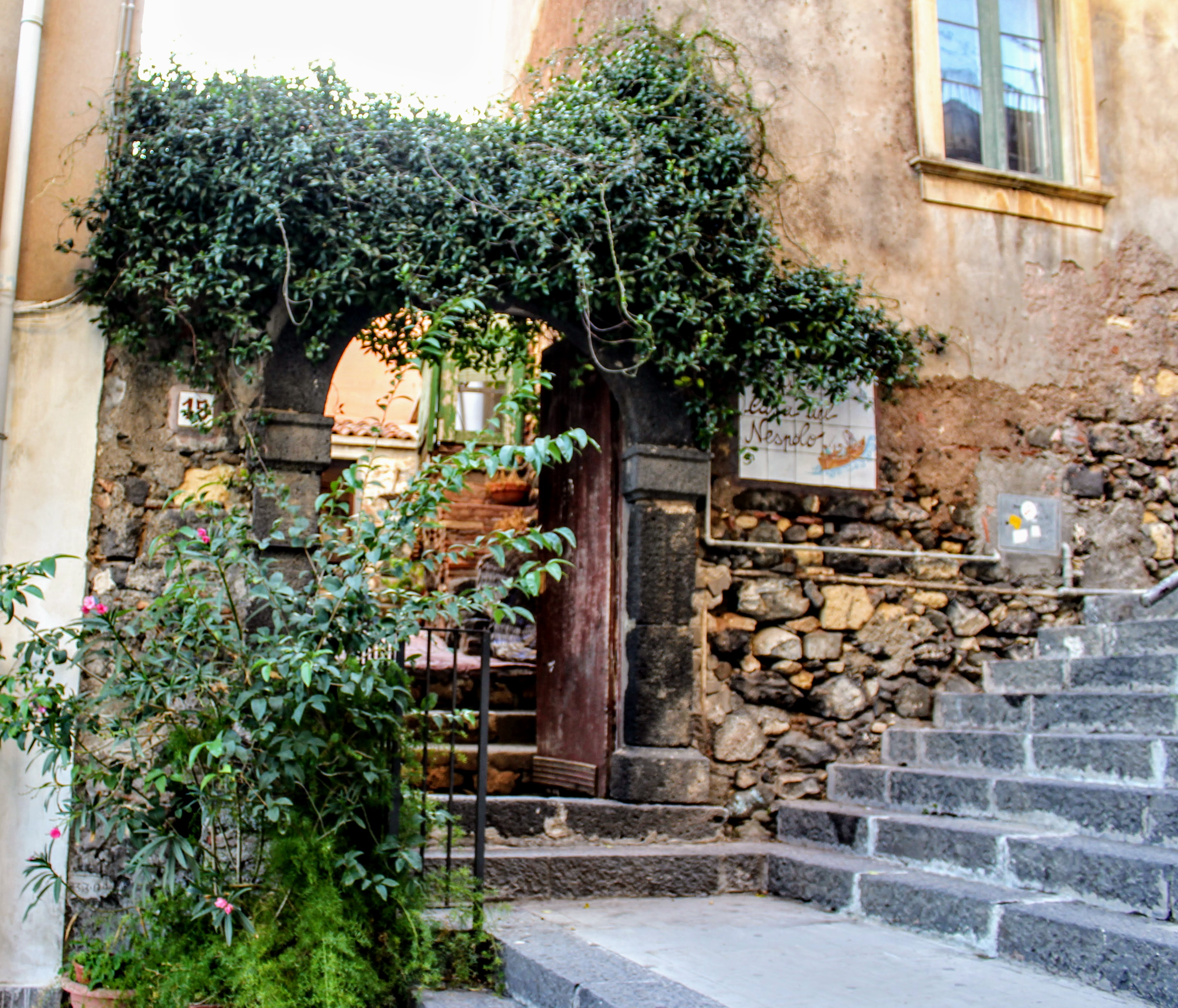 Museo di Aci trezza ispirato alla casa della famiglia Toscano descritta nel libro "I Malavoglia" di Giovanni Verga.